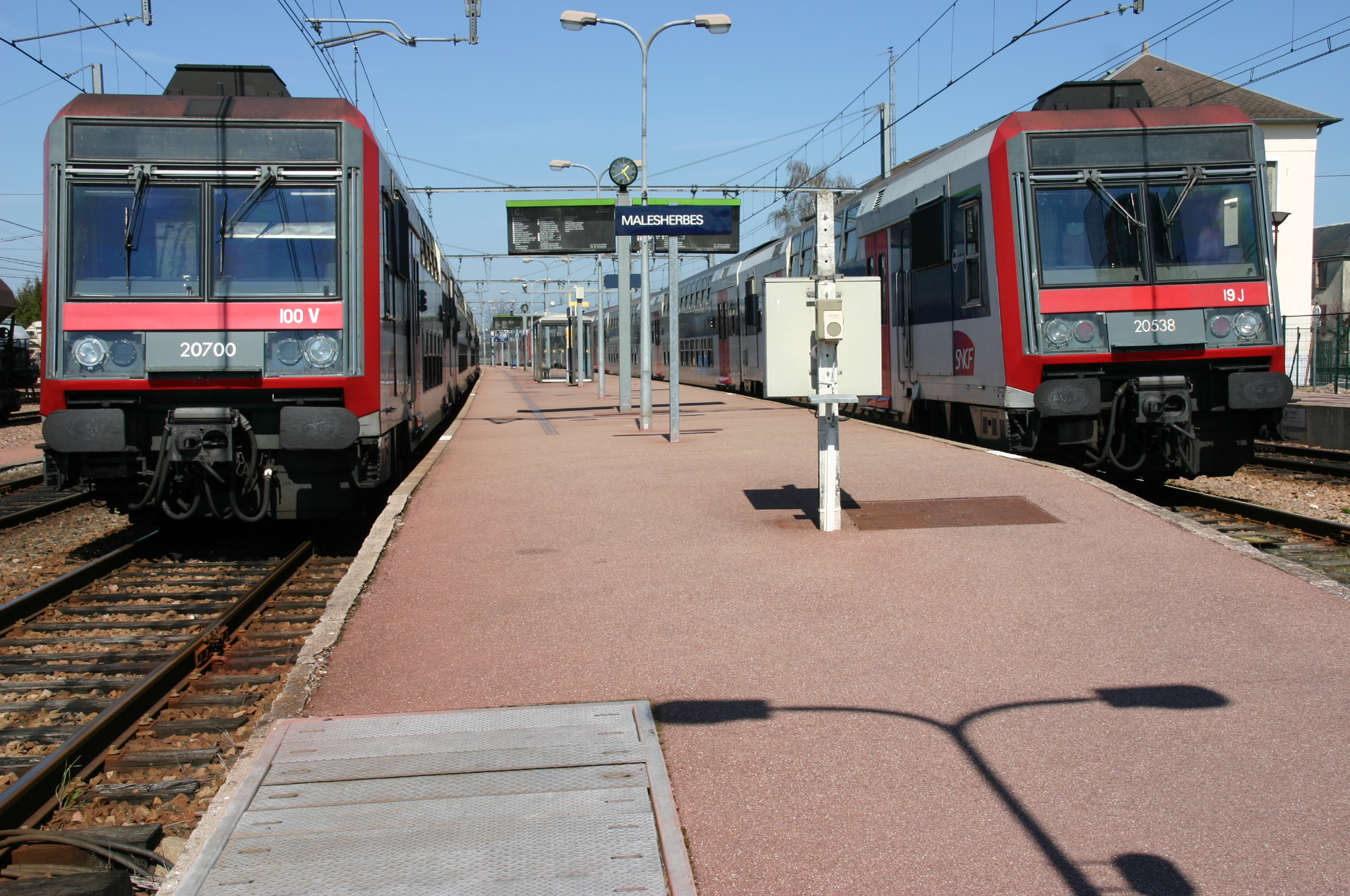 Gare de Malesherbes, Loiret (France)